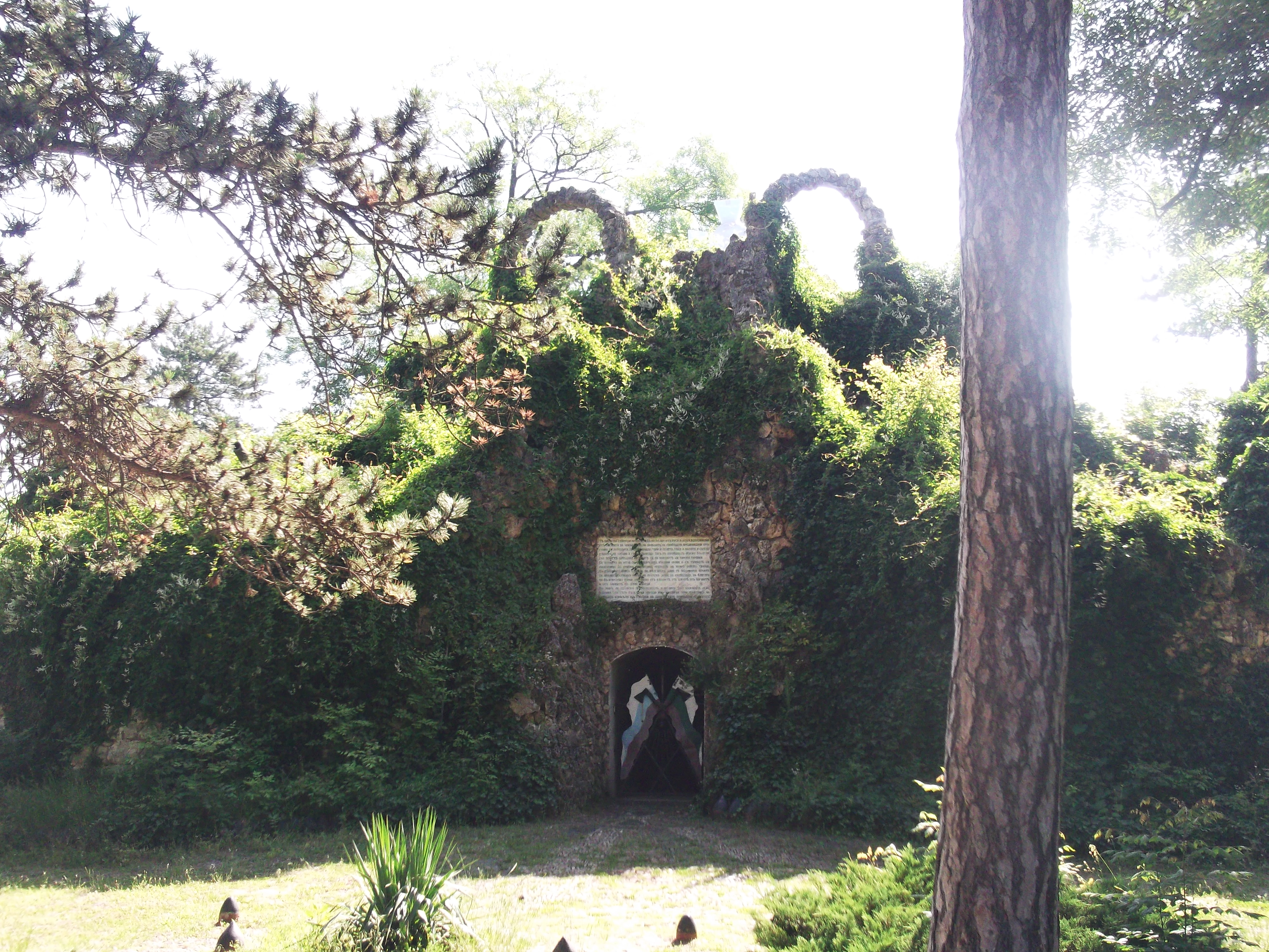 Костница-гробница с костите на загиналите от 61 Владимирски полк, 62 Суздалски полк, 4 драгунски Екатеринославски полк и 4 Донски казашки полк през периода 8 юли - 28 ноември 1877 г.